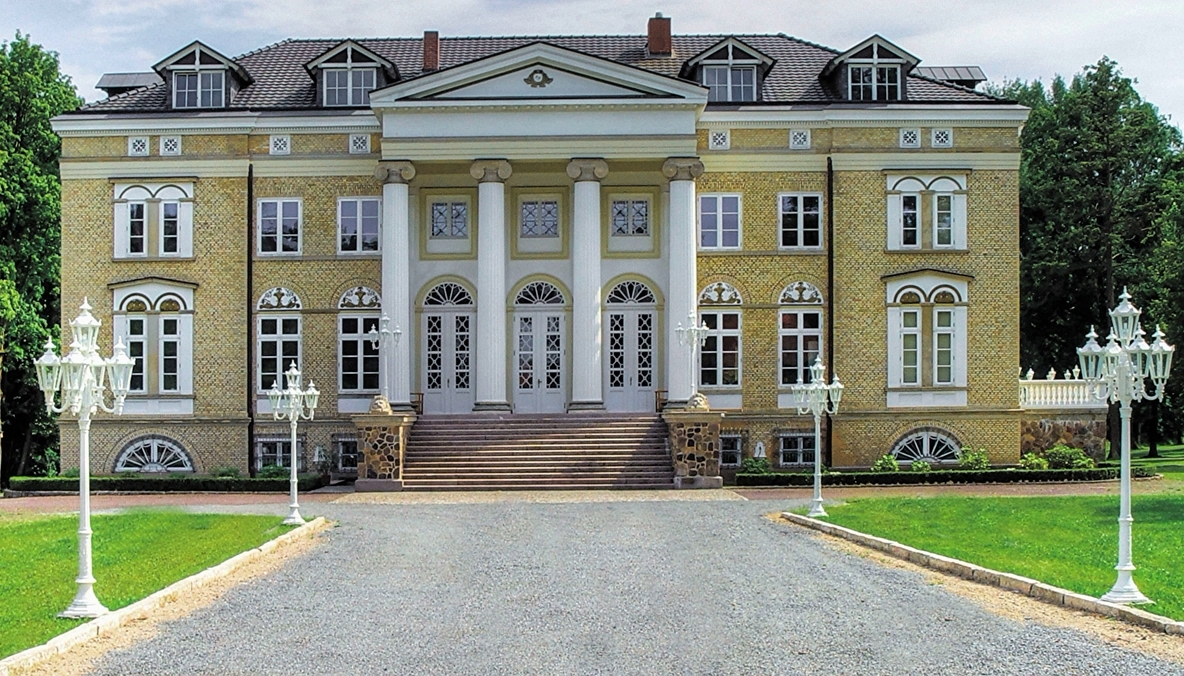 Herrenhaus Tüschow, nach der Sanierung